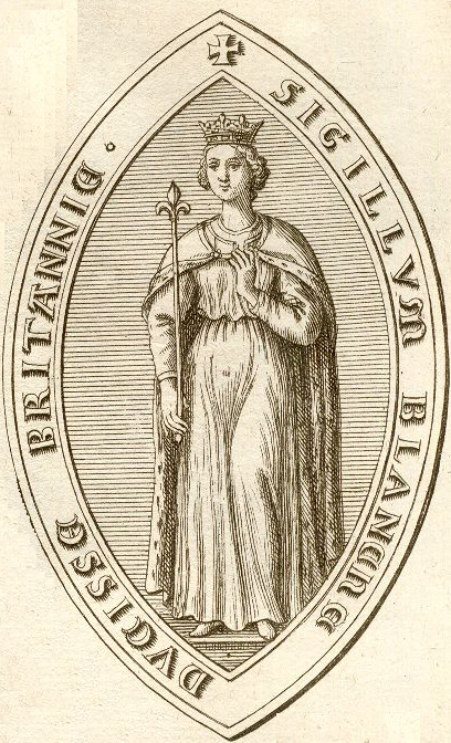 Sceau de Blanche de Navarre, Duchesse de Bretagne